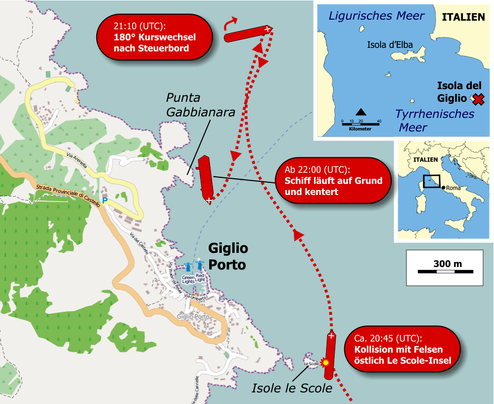 Übersichtskarte der Havarie der Costa Concordia. Eigene Arbeit. Quellen: Medienberichte, AIS-Daten zum Kurs: [1]